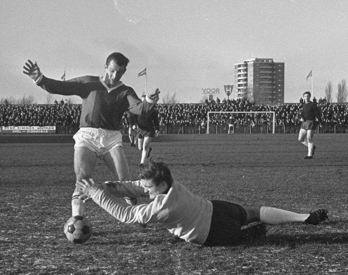 Voetbal Haarlem tegen ADO 2-1, vriendschappelijk, keeper Ronnie Boomgaard (Haarlem) in duel met Harry Heijnen.